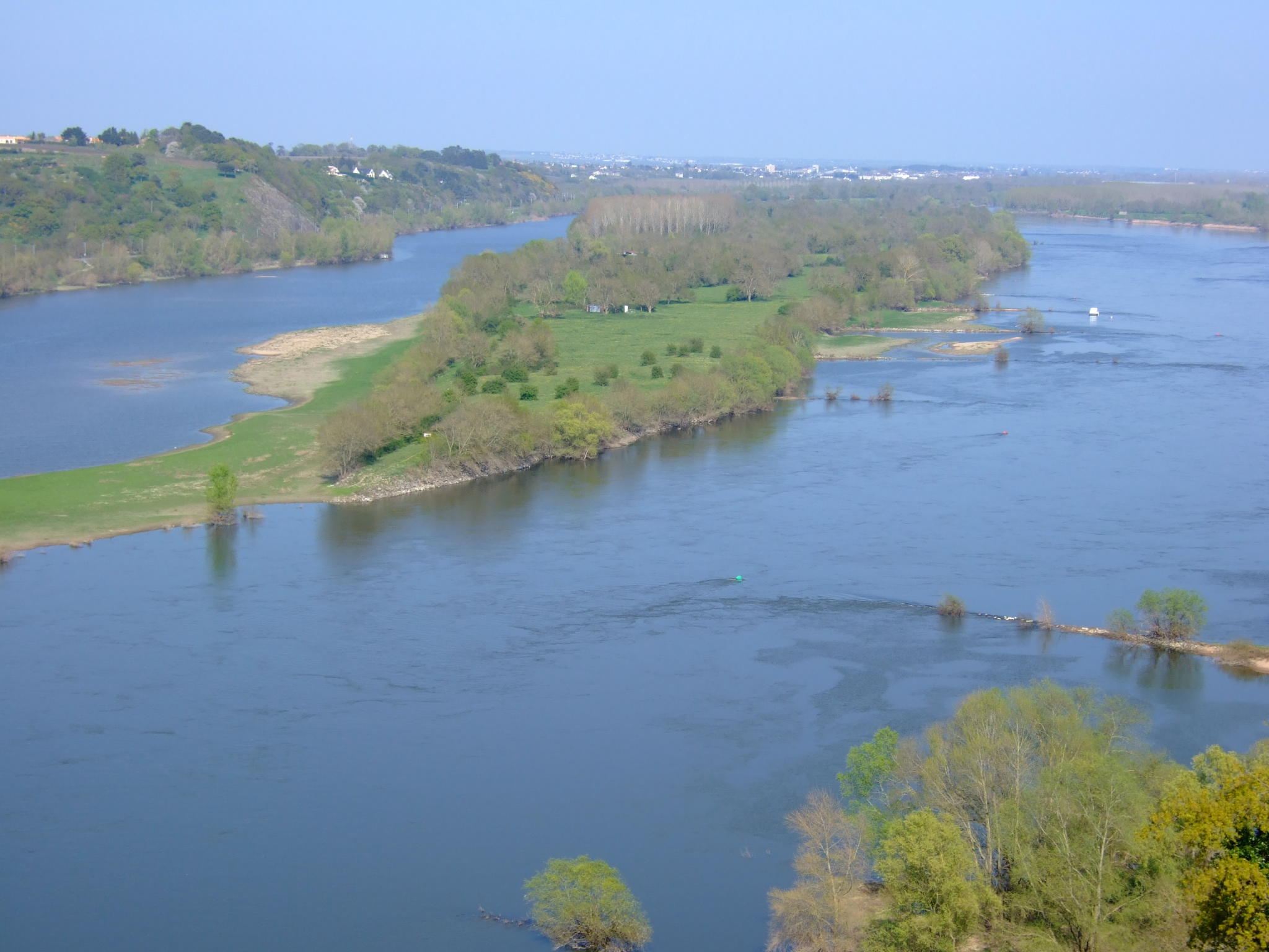 La Loire et l'Île Neuve-Macrière vus depuis la promenade de Champalud à Champtoceaux